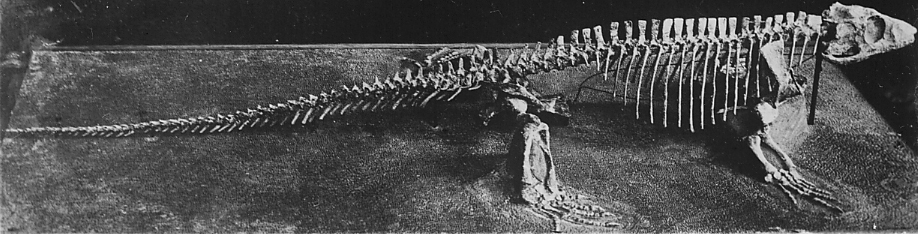 Varanosaurus brevitroetris